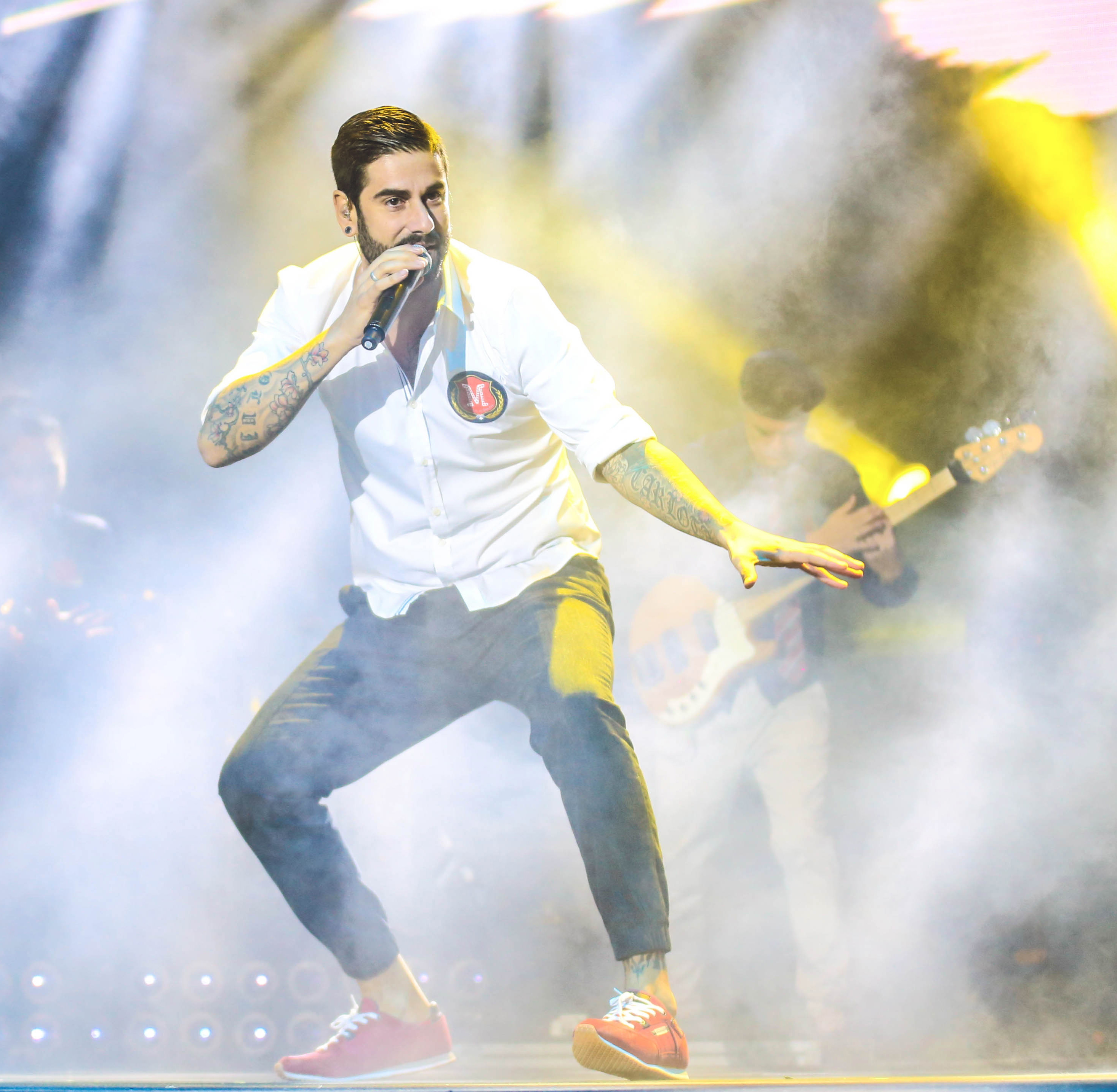 Melendi en Laguna de Duero (Valladolid)